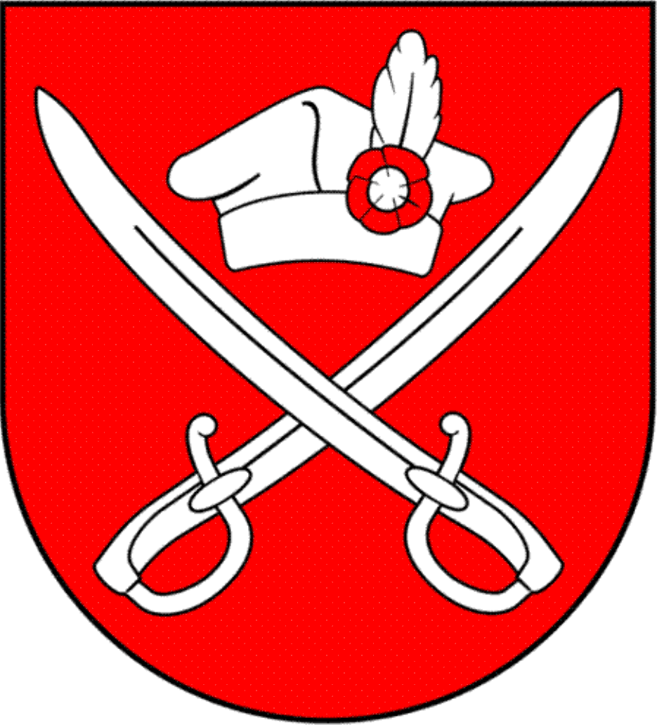 Herb gminy Żyrzyn